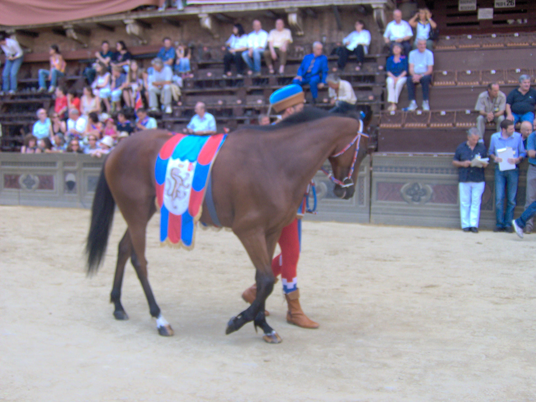 Image del corte del Palio di Siena - agosto 2006